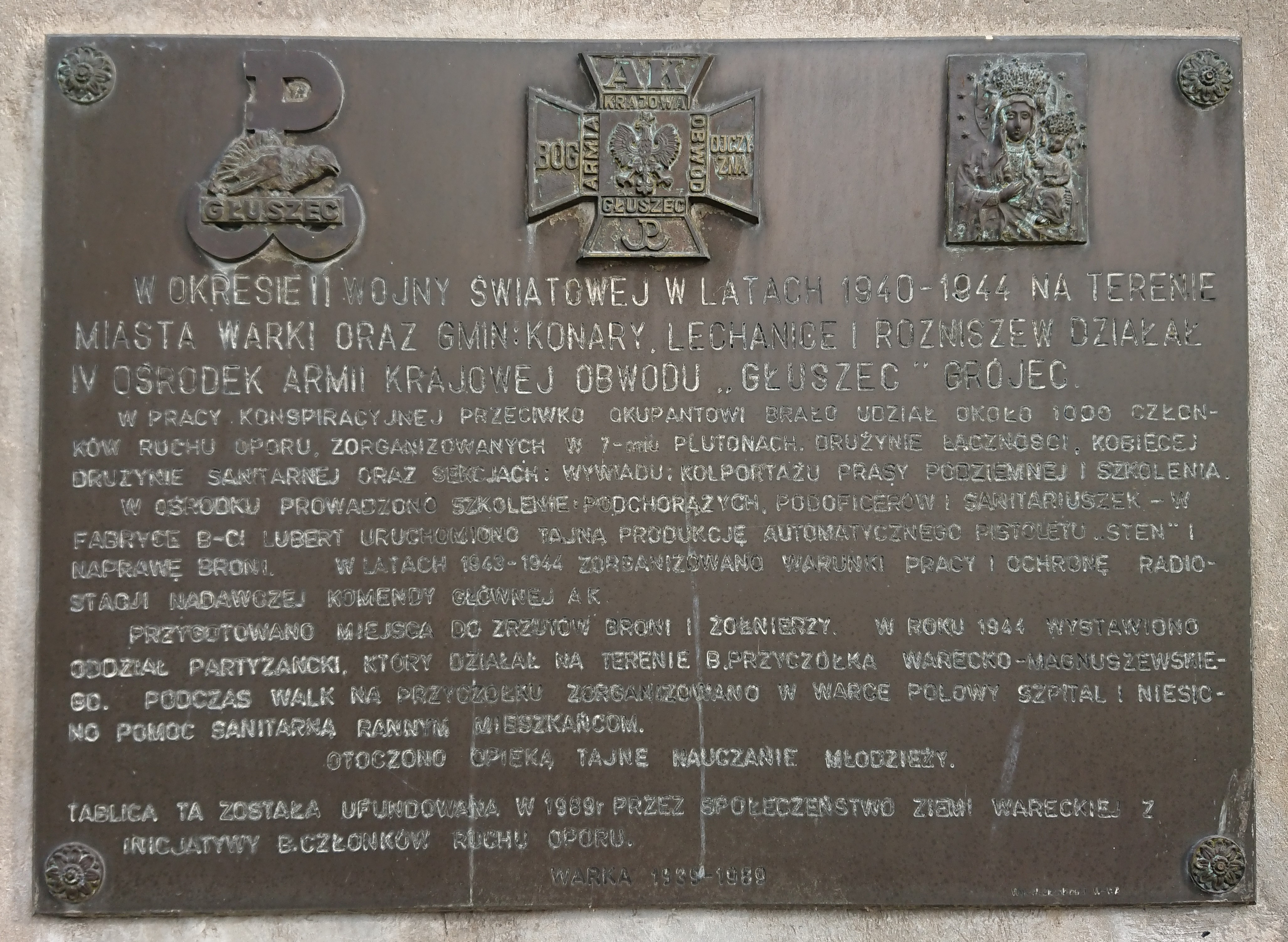 Tablica na zewnętrznej ścianie kościoła (na lewo od głównego wejścia) Matki Bożej Szkaplerznej w Warce poświęcona IV Ośrodkowi Obwodu Grójec AK